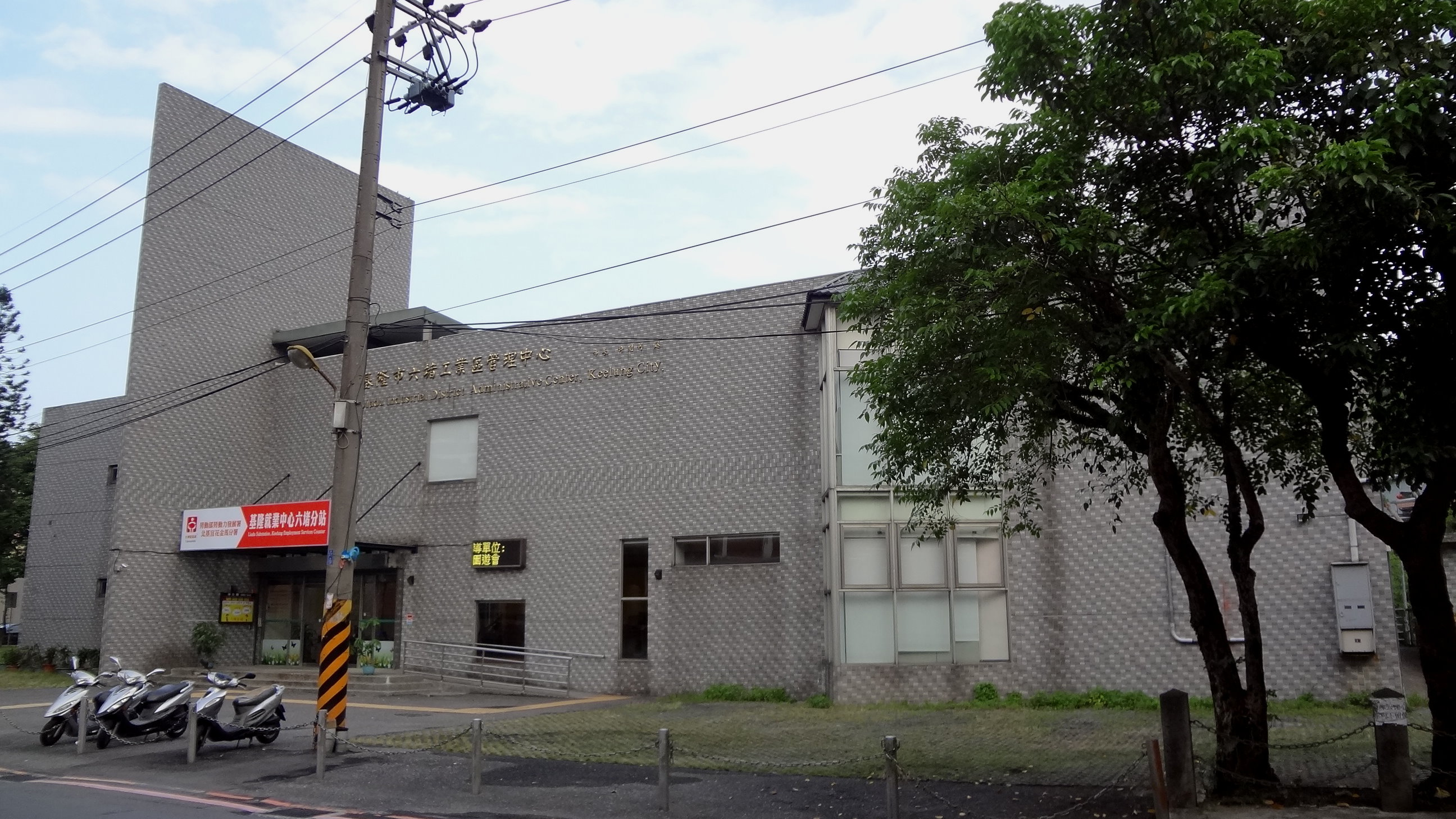 中華民國勞動部勞動力發展署北基宜花金馬分署基隆就業中心六堵分站，地址：基隆市七堵區工建北路1之2號（原六堵工業區管理中心）。